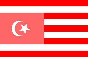 Флаг Бухары (в восстании с 6 апреля 1922 по 15 июля 1923 года)